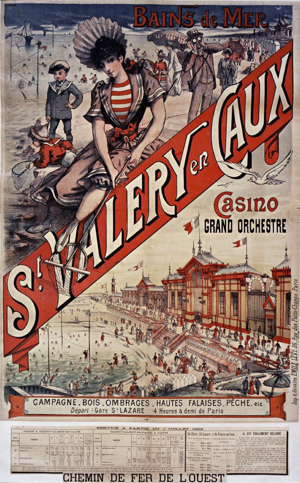 Affiche de la Compagnie des chemins de fer de l'Ouest pour les bains de mer à Saint-Valery-en-Caux